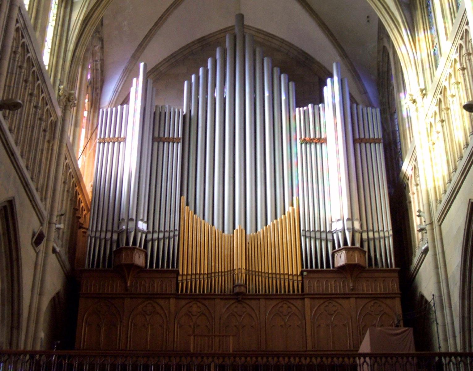 Organo de la Catedral del Buen Pastor de San Sebastián (Guipúzcoa, País Vasco, España)